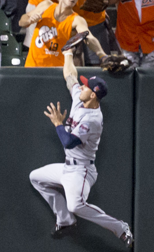 Jordan Schafer